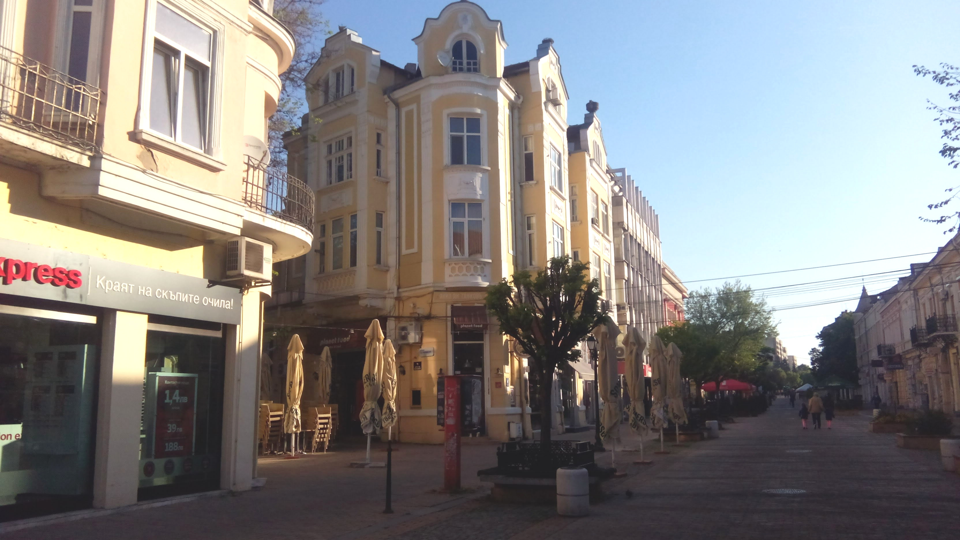 Къщата на Янко Танков